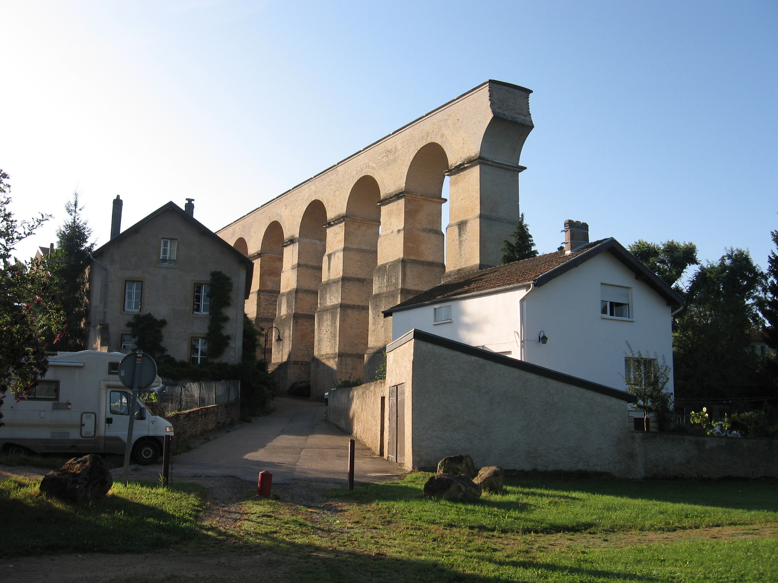 Roman aqueduct at Jouy-aux-Arches